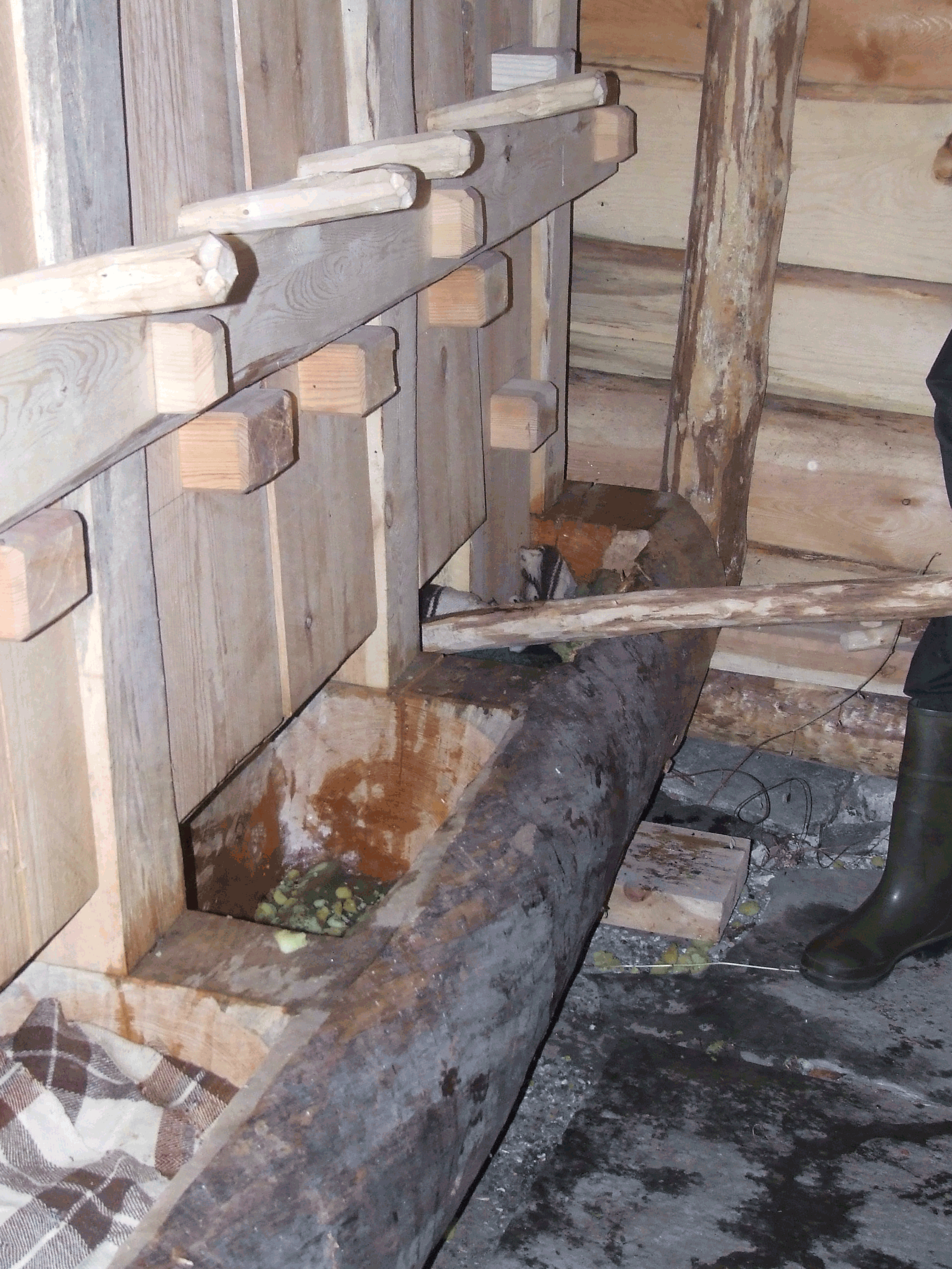 Ullstoff i trau som stampes